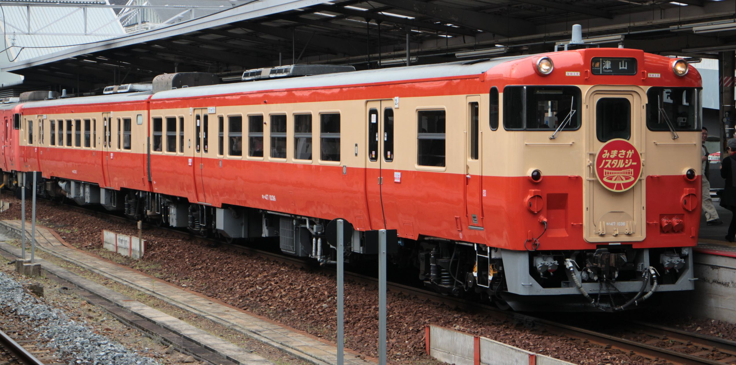 JR西日本キハ47系 みまさかノスタルジー 岡山で撮影